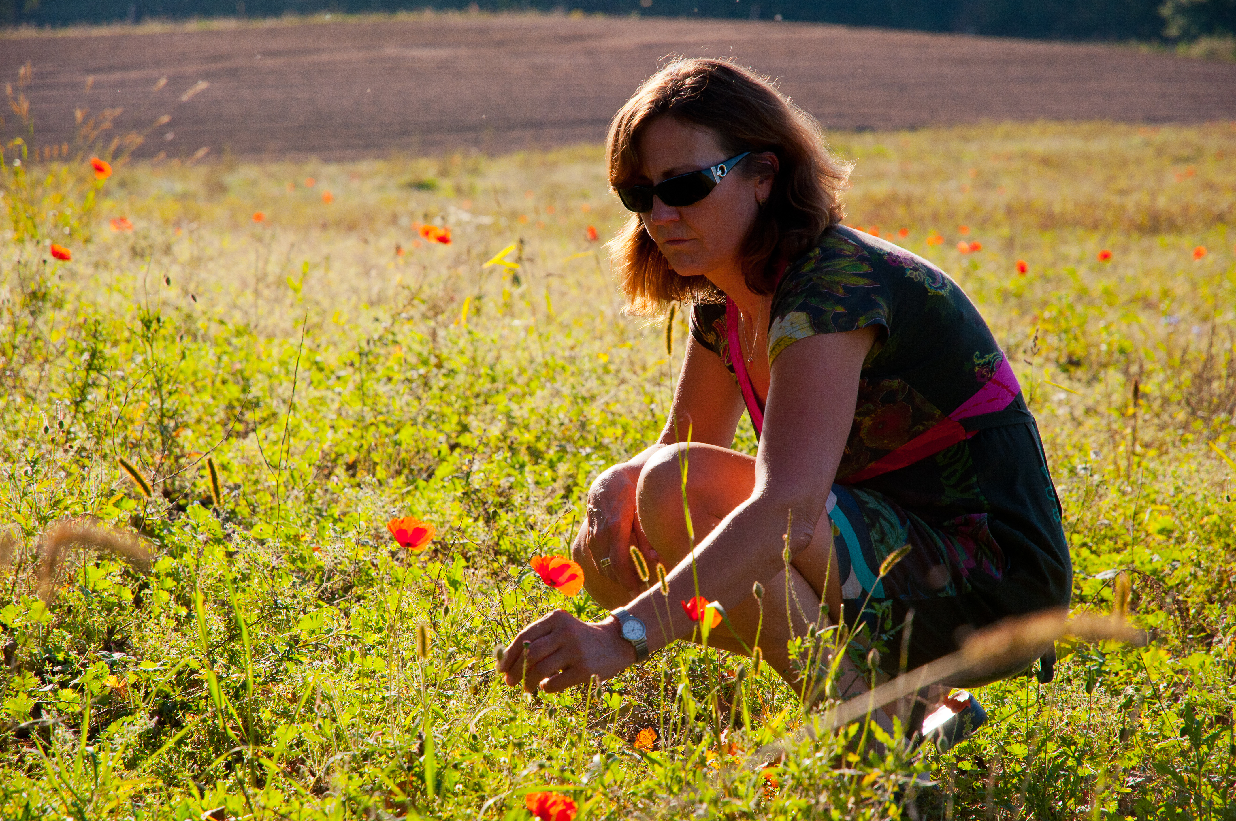 Brachfeld bei Britz